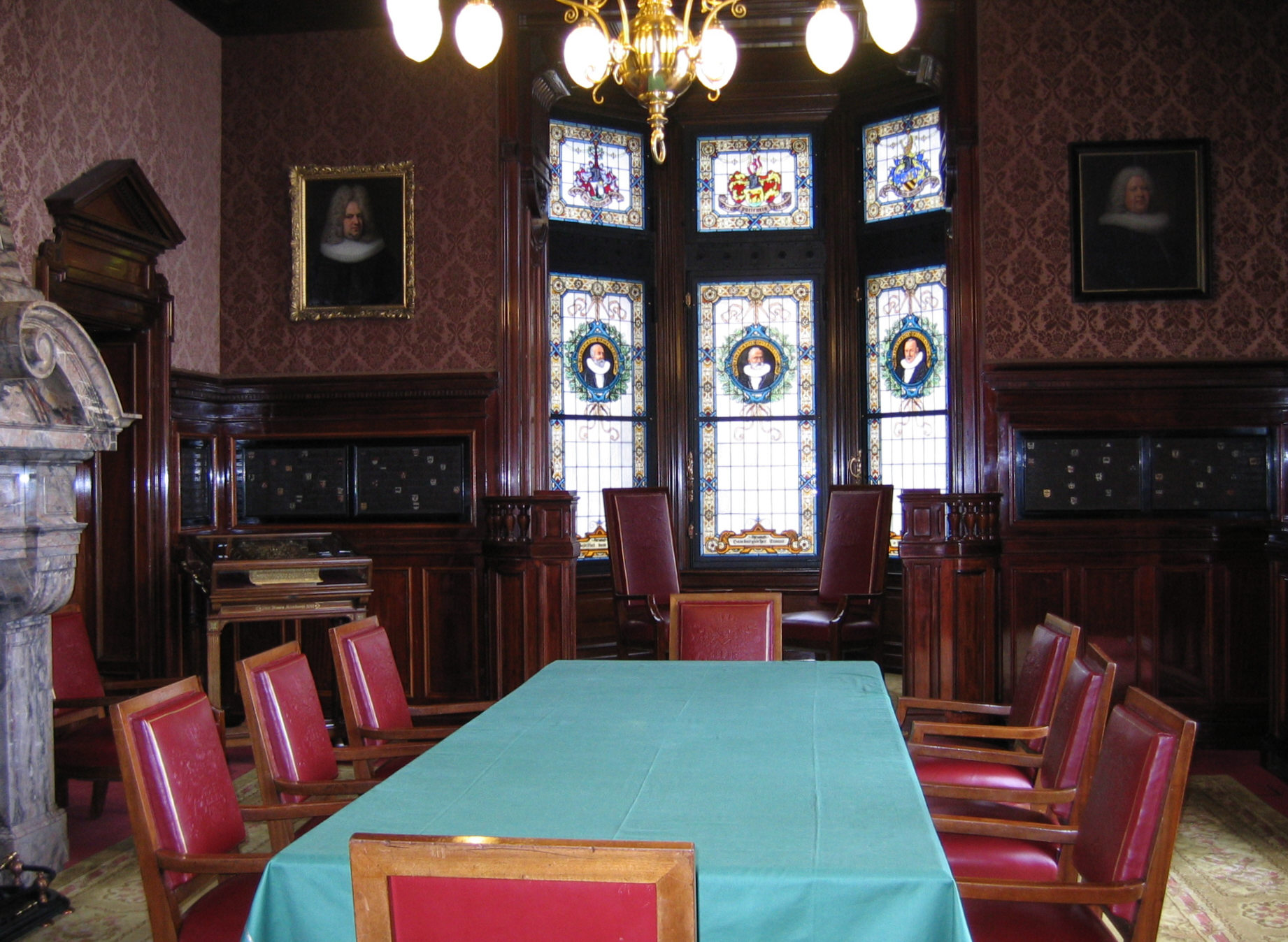 Innenansicht Hamburger Rathaus: offizielles Bürgermeister-Büro mit Goldenem Buch der Stadt (links hinten) This is the photograph of an architectural monument. It is part of the list of cultural monuments of Hamburg, no. 40